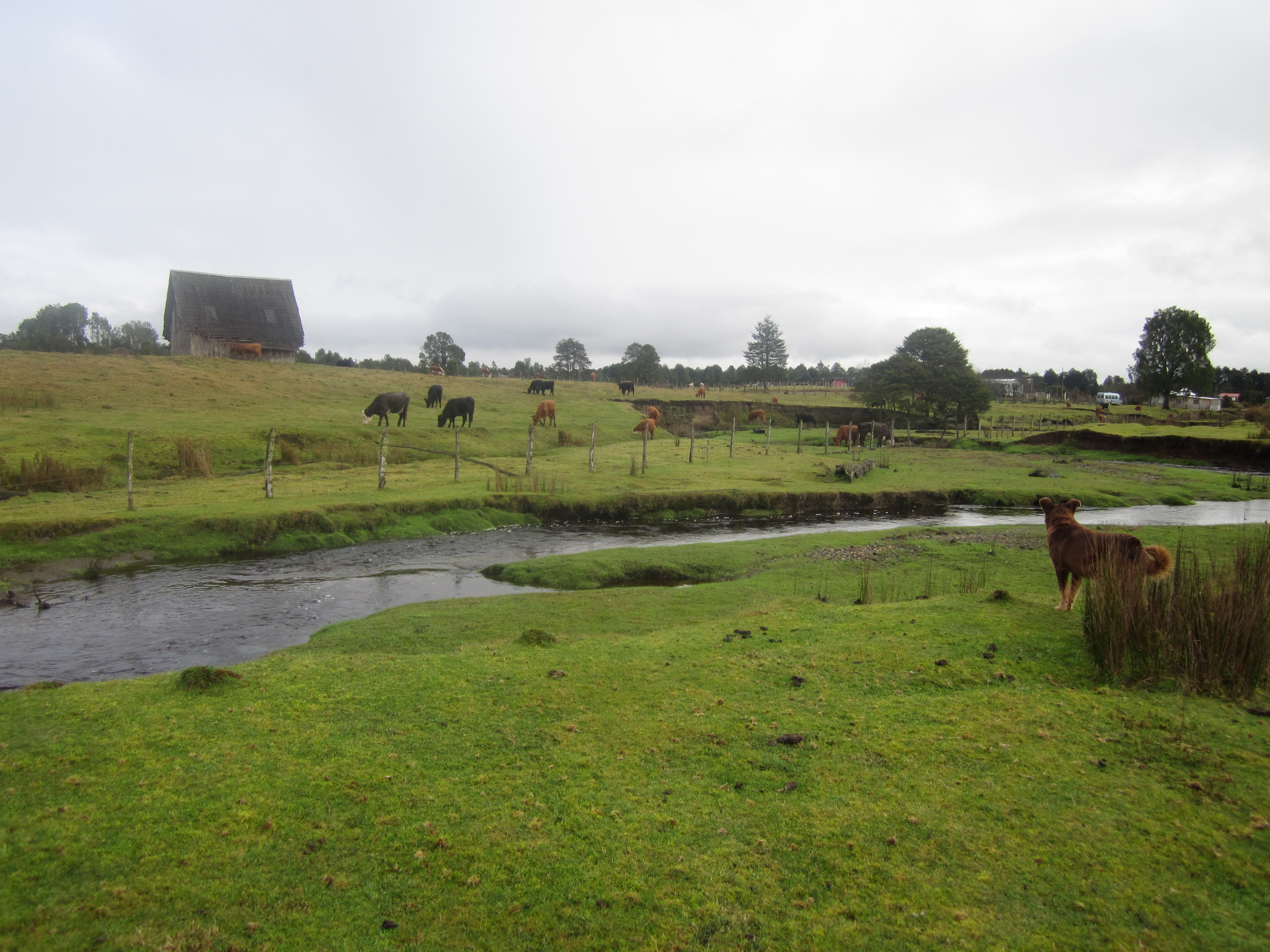 Vista del sitio de Monte Verde.